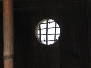 一茶逗留の離れ屋の丸窓